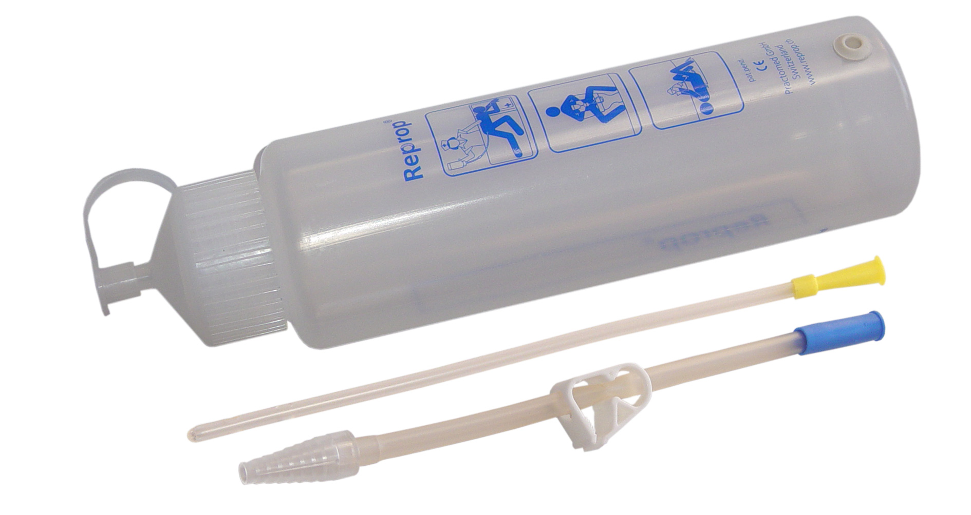 Pompe Clystère, Produit: Reprop Clyster